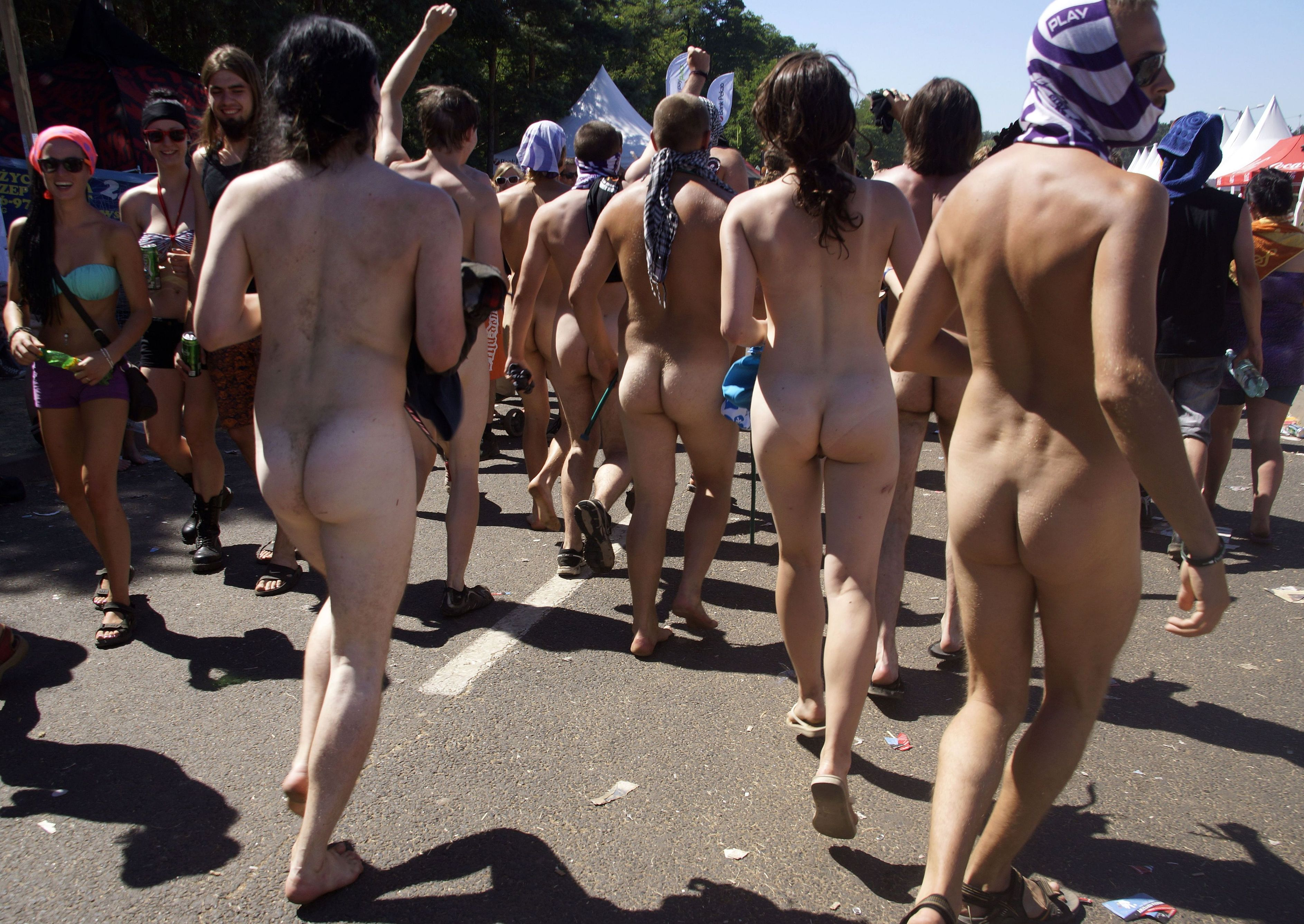 Przystanek Woodstock 2013. Pierwszy Nagi Bieg